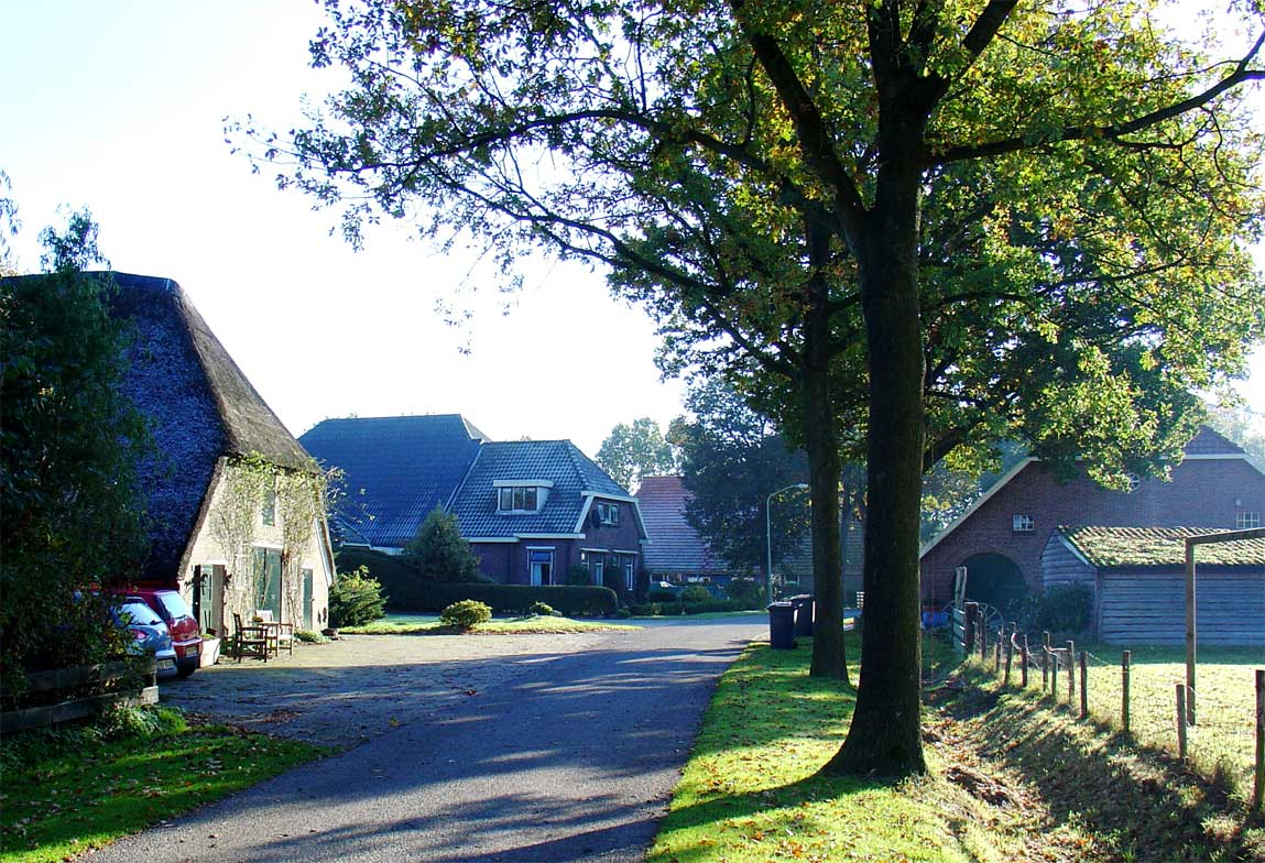 Dorpsgezicht Mantinge